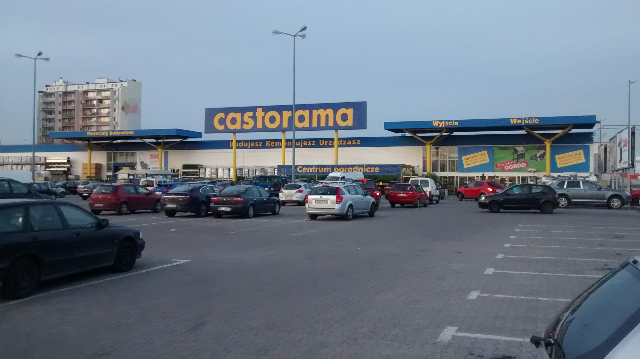 Castorama w dzielnicy Widok